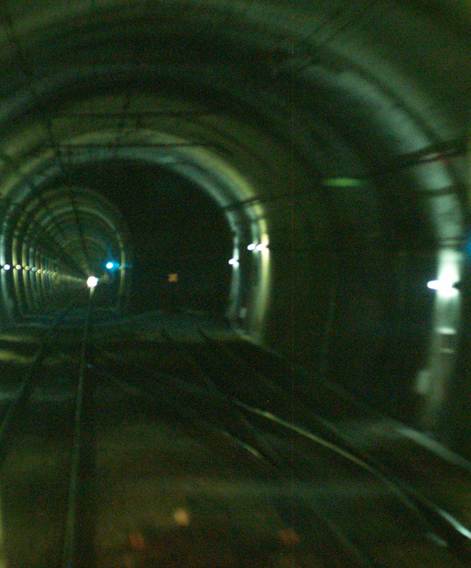 正丸トンネル信号所（正丸寄りのポイントを上り列車内から撮影）